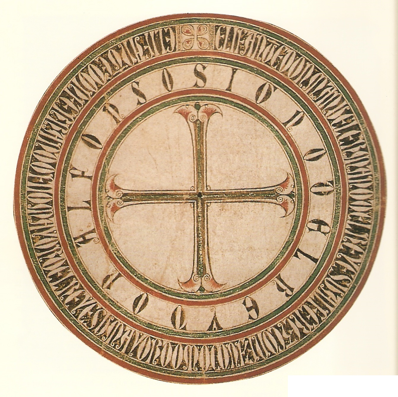 Rueda de un privilegio rodado del rey Alfonso X de Castilla (1221-1284). El documento se custodia en el monasterio de San Clemente de Sevilla, provincia de Sevilla (España).